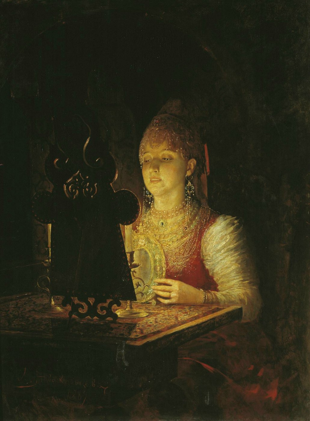 Новоскольцев Александр «Светлана». 1889 Вольский краеведческий музей